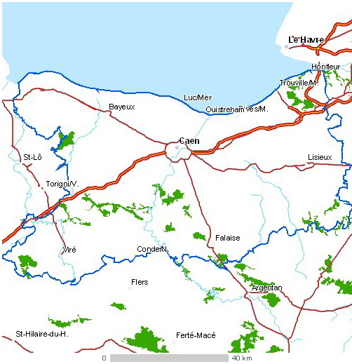 Carte du département Calvados Légende